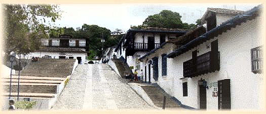 Opera a 4 mani Lodeijk Vadacchino-MeridaItalia, rilasciamo in cc-by-sa, sotto il nome Jaji -un pueblo de Ejido2.jpg. l'Immagine Raffigura un quartiere della città di Ejido. Distinti Saluti--14:19, 1 mag 2010 (CEST)